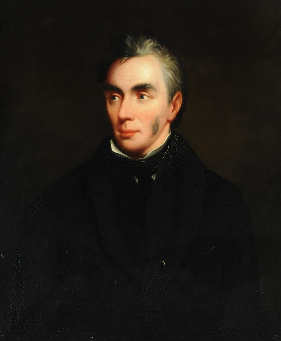 Ebenezer Elliott